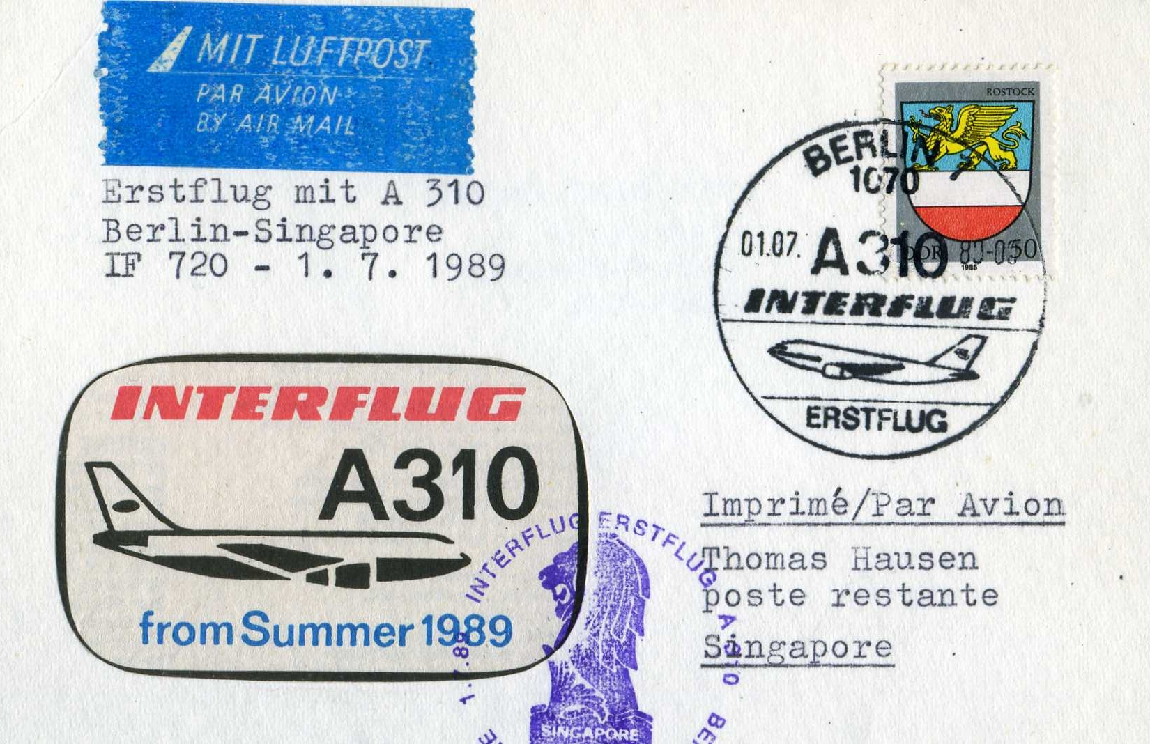 Erstflug Airbus 310 der Interflug